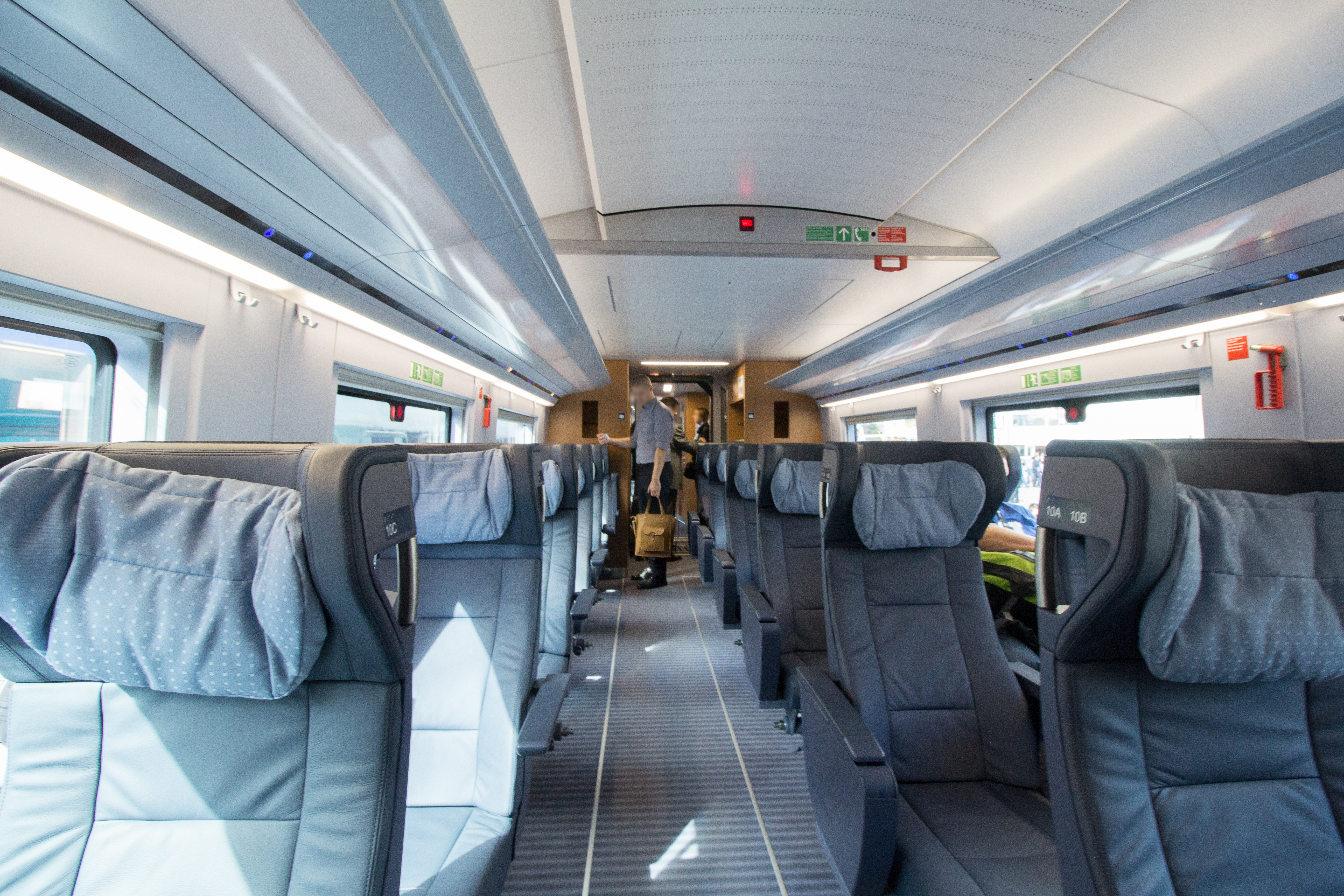 InnoTrans 2016 - TCDD HT 80000 - Siemens Velaro TR